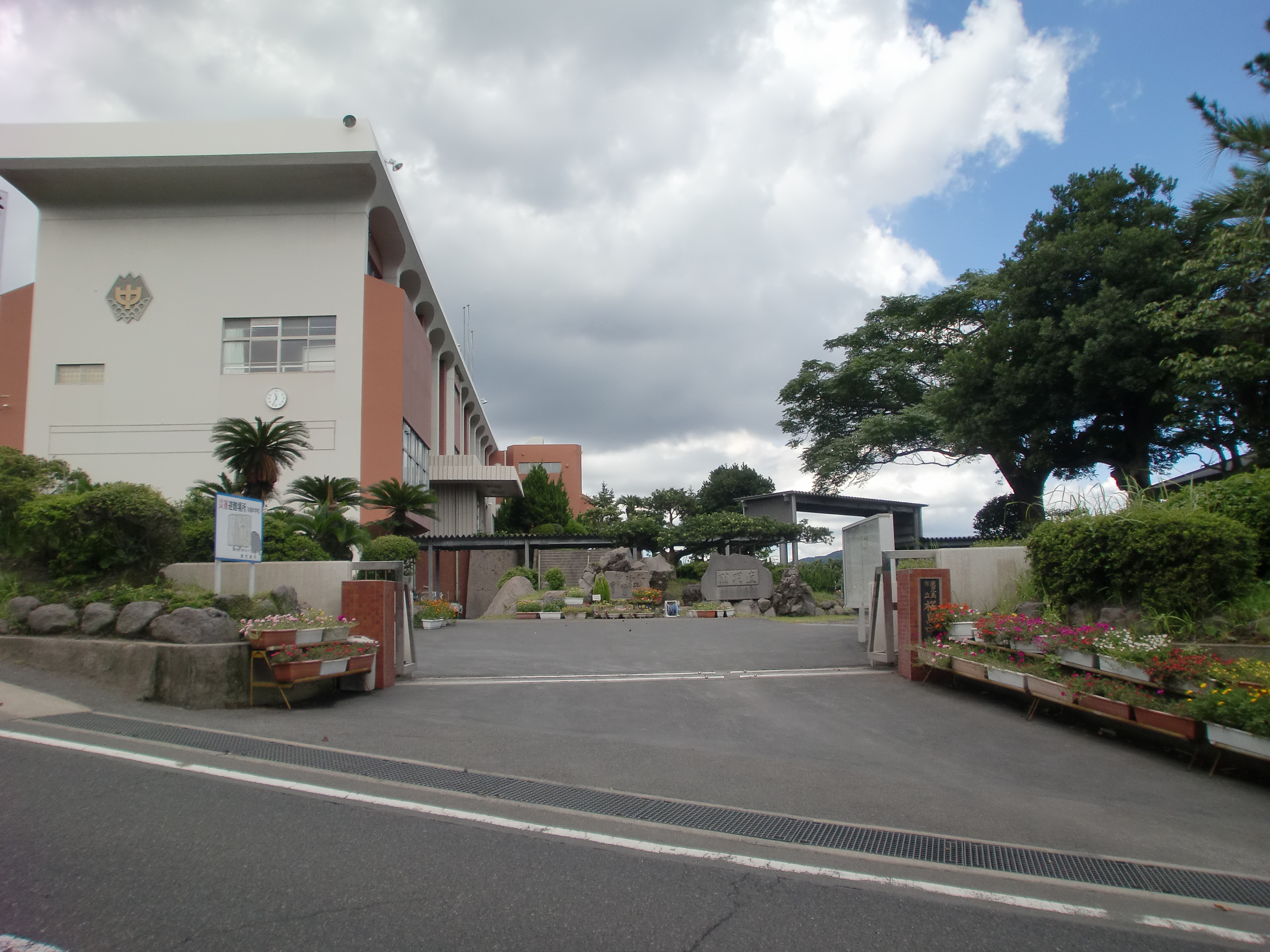 鹿児島市立桜島中学校の外観。